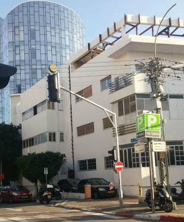 בית האגודה, ע"ש יעקב פזי, בתל אביב-יפו